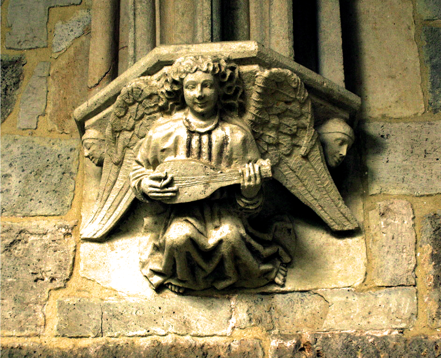 Ménsula con ángel músico. Claustro de la Iglesia Sta. María la Real Sasamón, Burgos, España, s XV